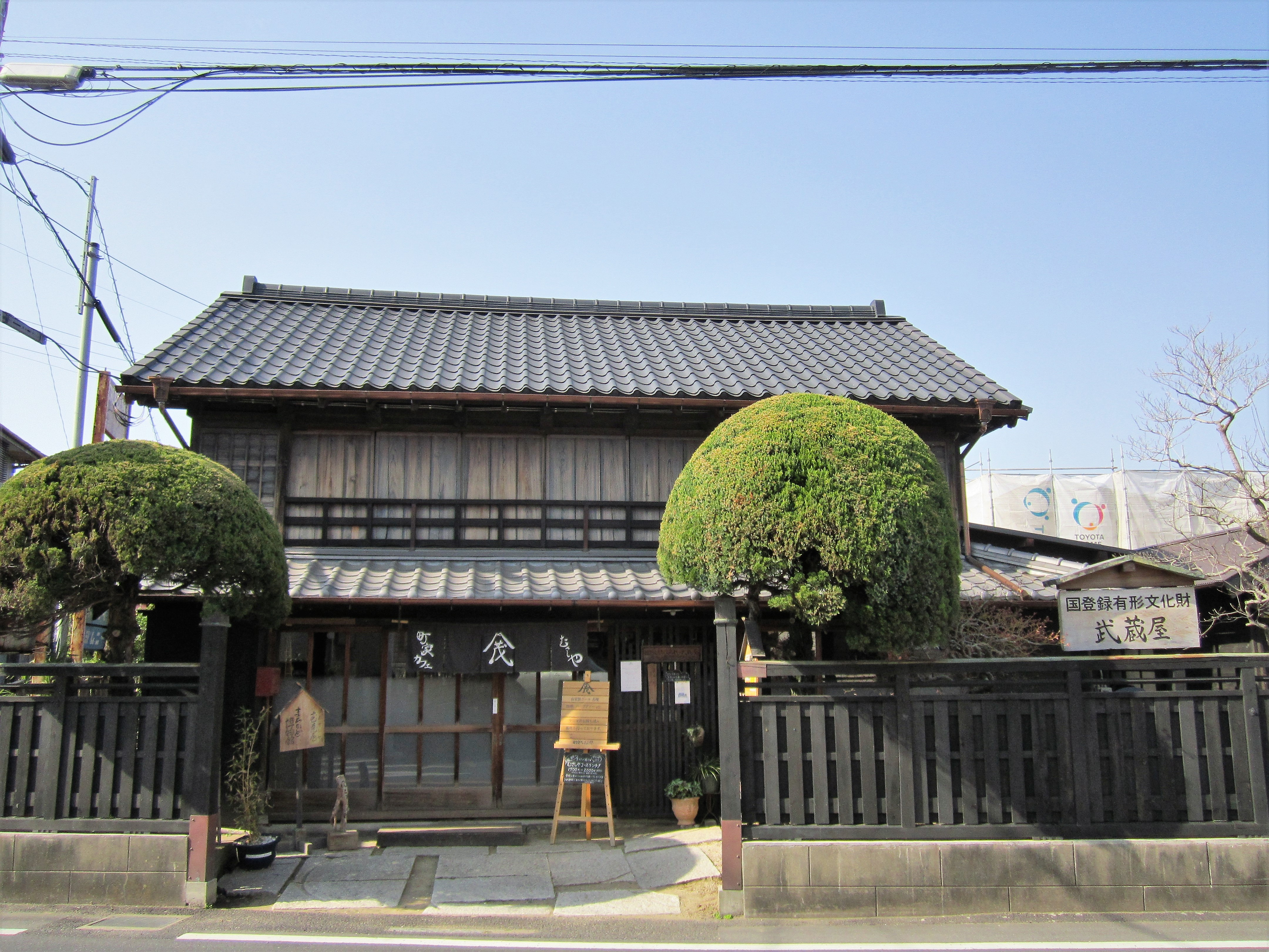 岩井家住宅主屋（旧武蔵屋店舗）（印西市木下） Canon PowerShot A2200